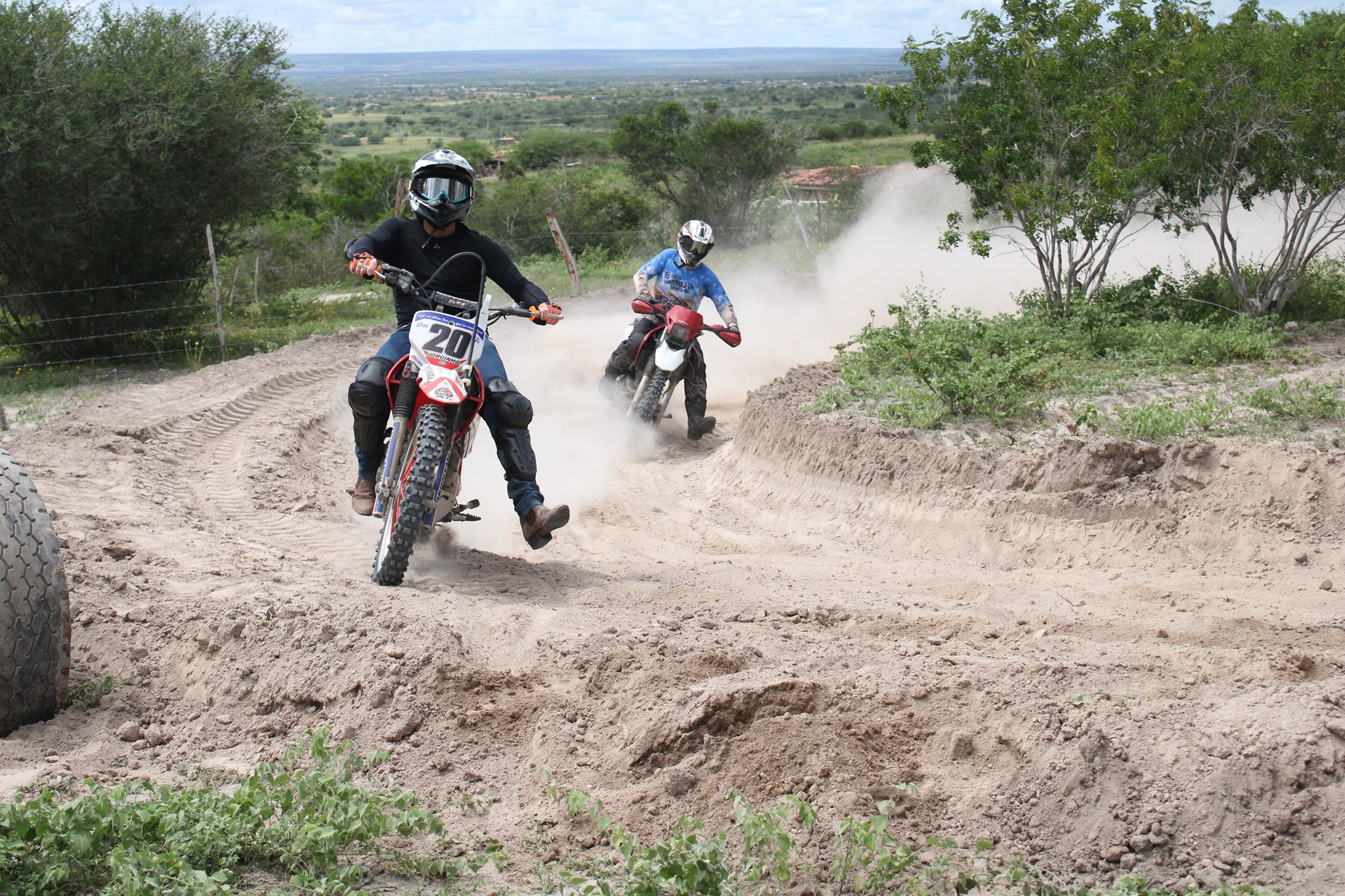 Registro de atletas em prática de esporte radical - motocross em Araci